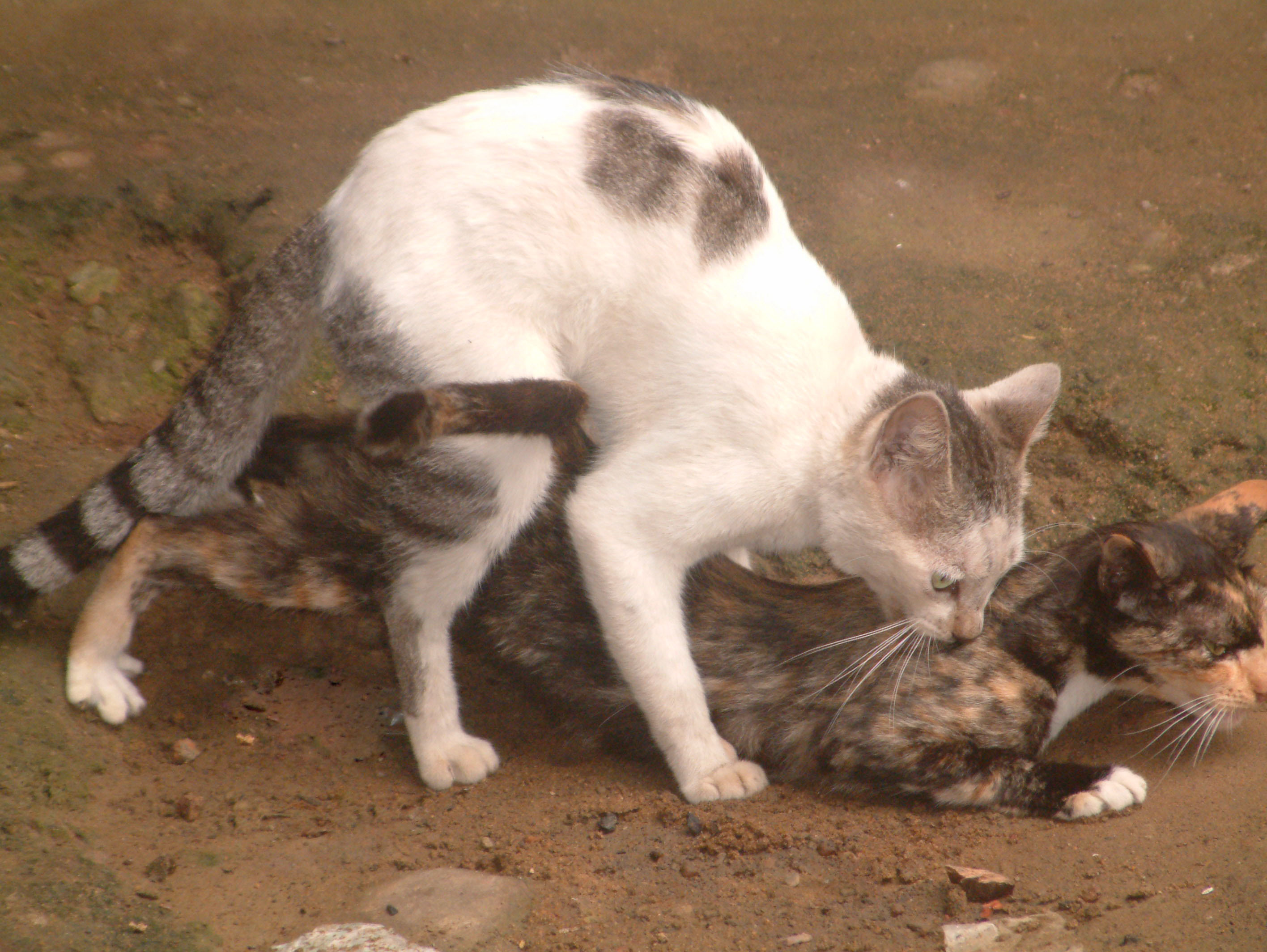 le chat blanc fait l’amour a la chate multicolor